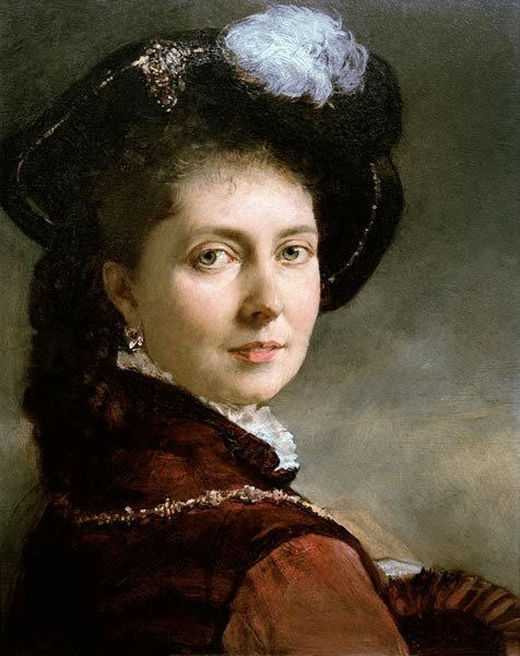 Kaiserin Viktoria